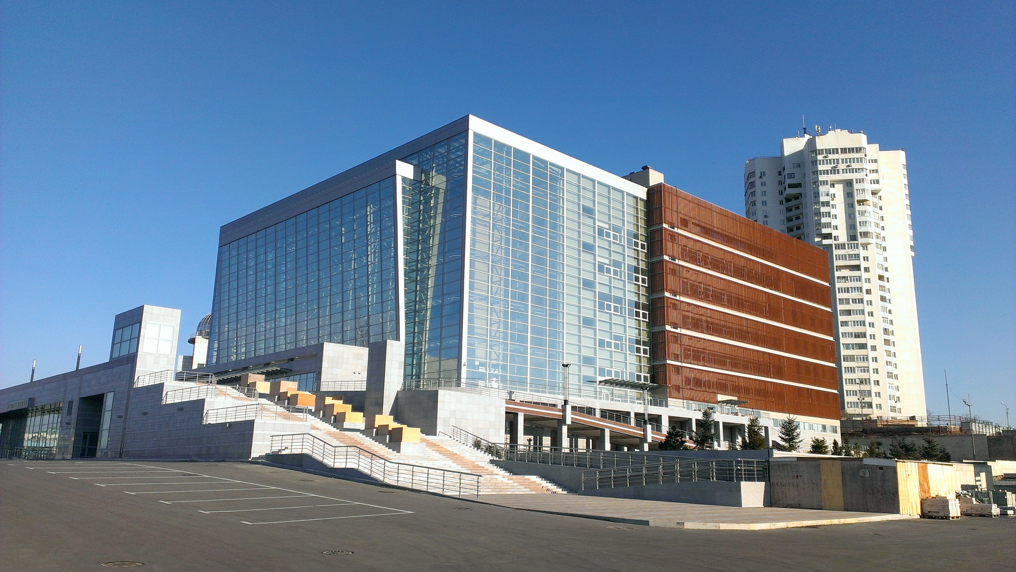 Новый театр оперы и балета во Владивостоке открыт в 2013 году на улице Фастовской